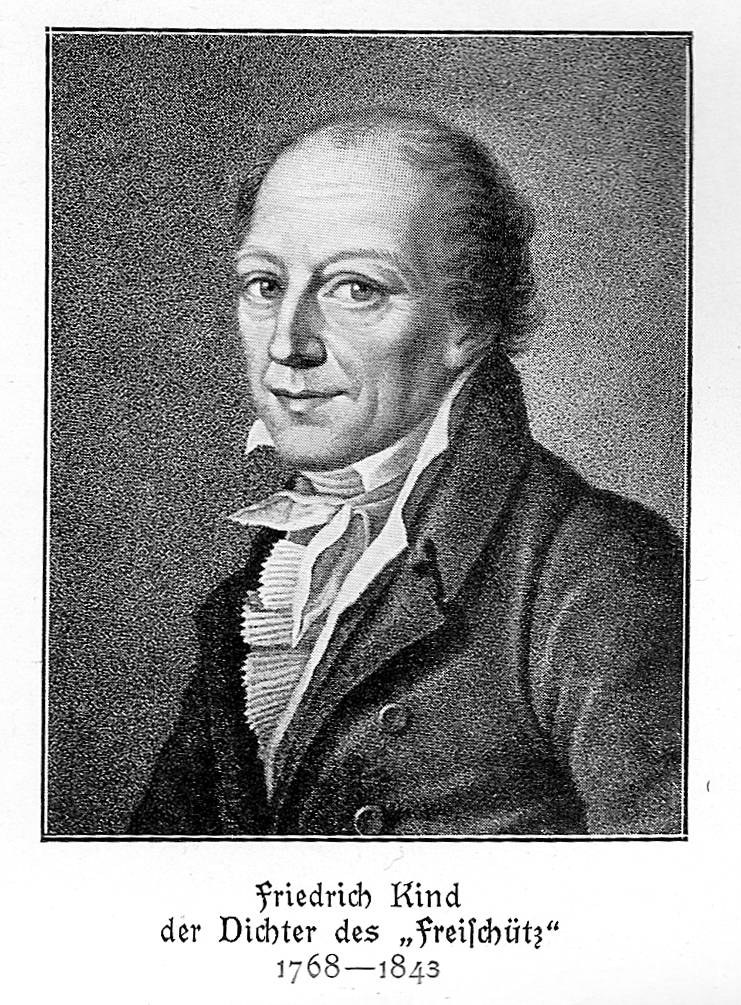 Aus Spemanns goldenes Buch des Theaters (1902). Scan --Goerdten 13:21, 7. Feb. 2007 (CET)